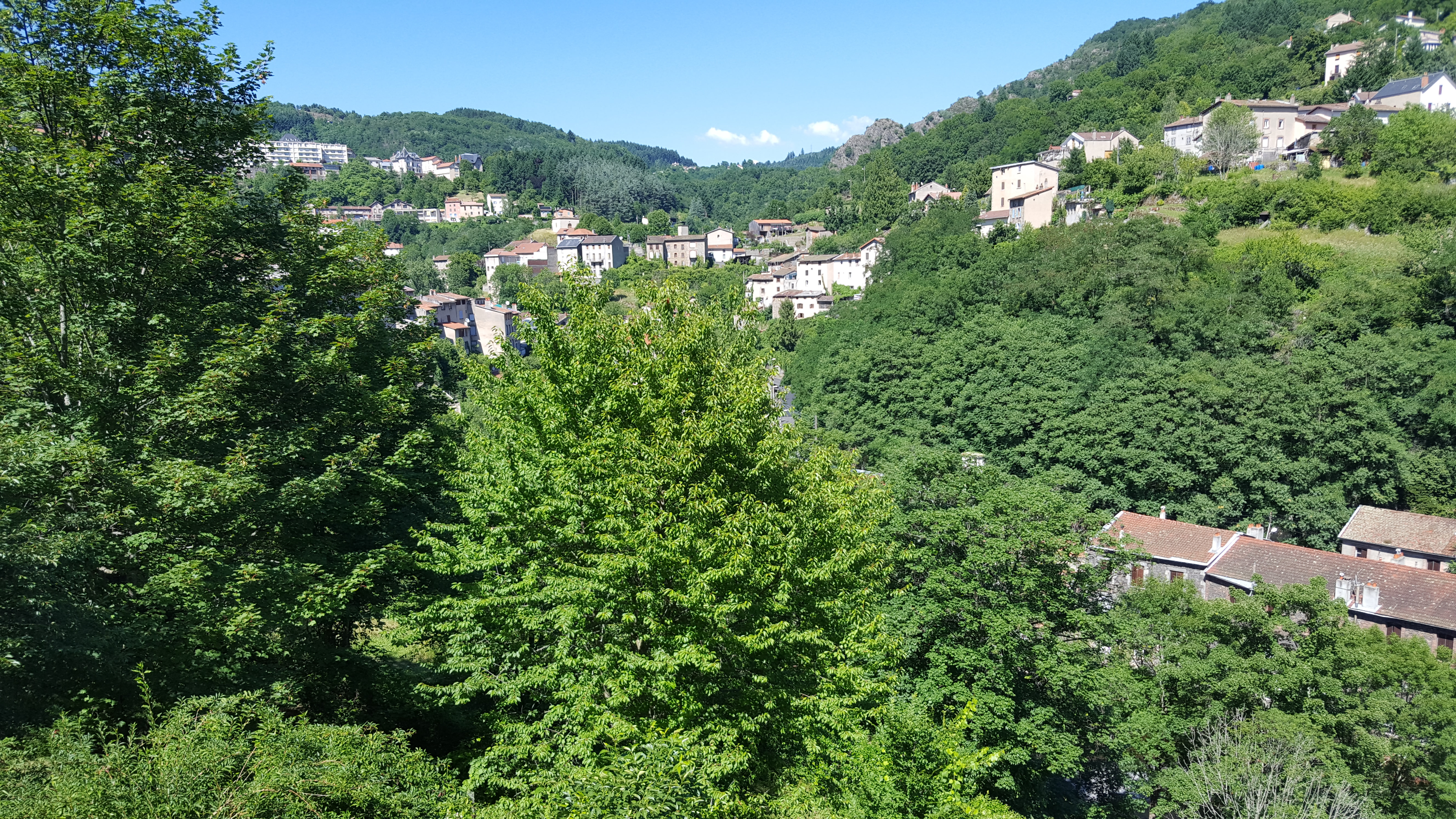 Vallée des usines à Thiers en Auvergne.